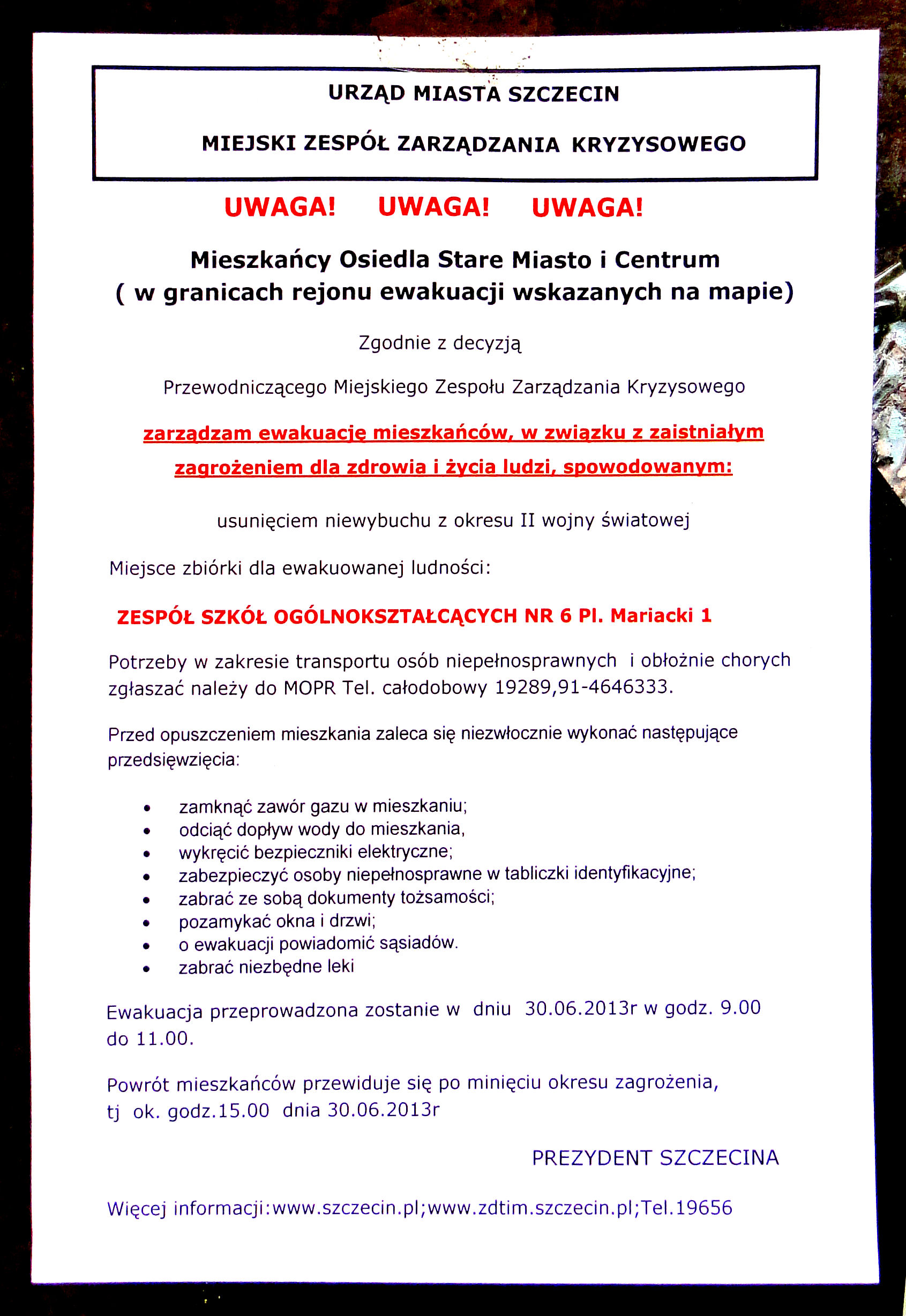 Ogłoszenie o ewakuacji w Szczecinie w dniu 30.06.2013